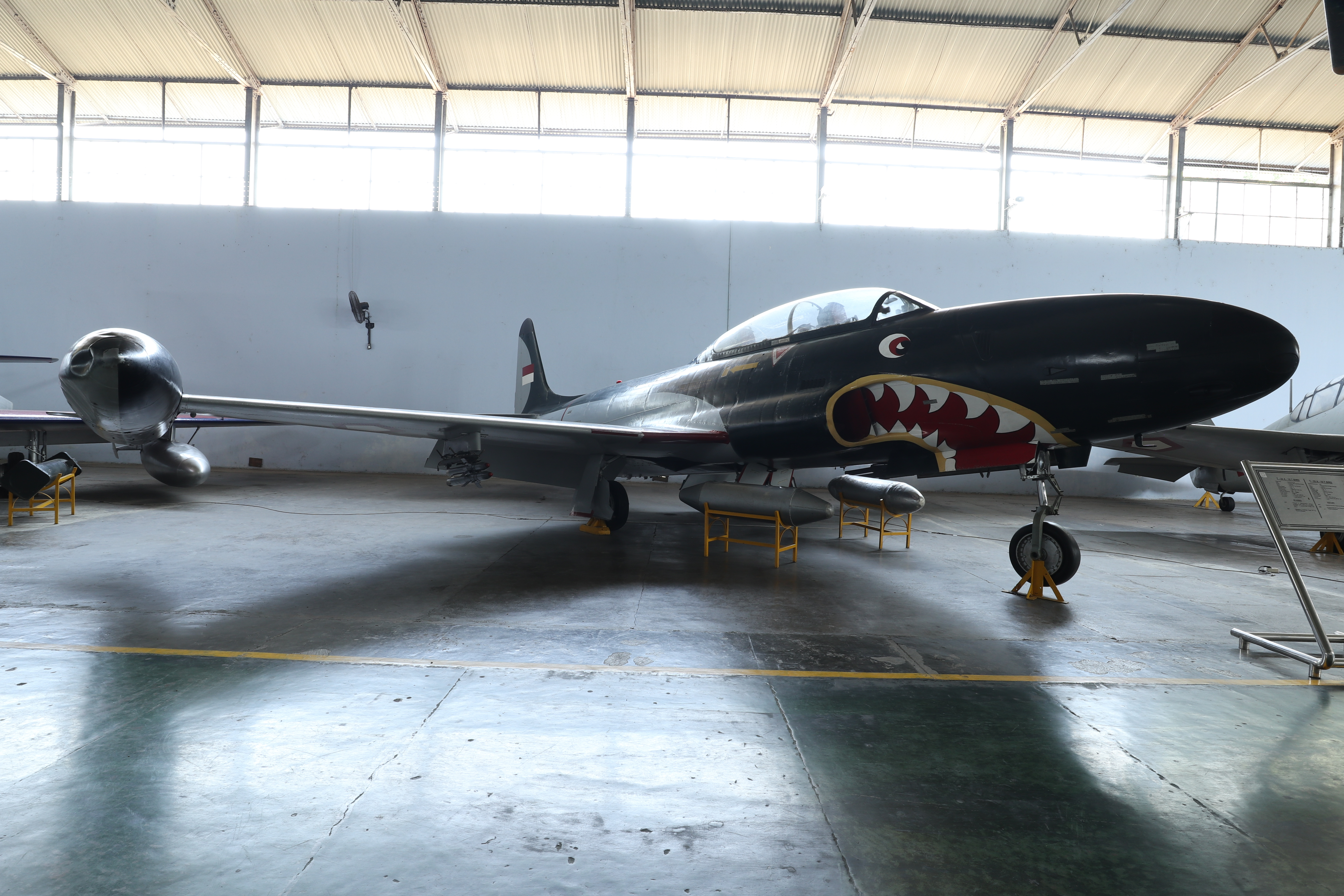 Pesawat T-33A-10-T-Bird